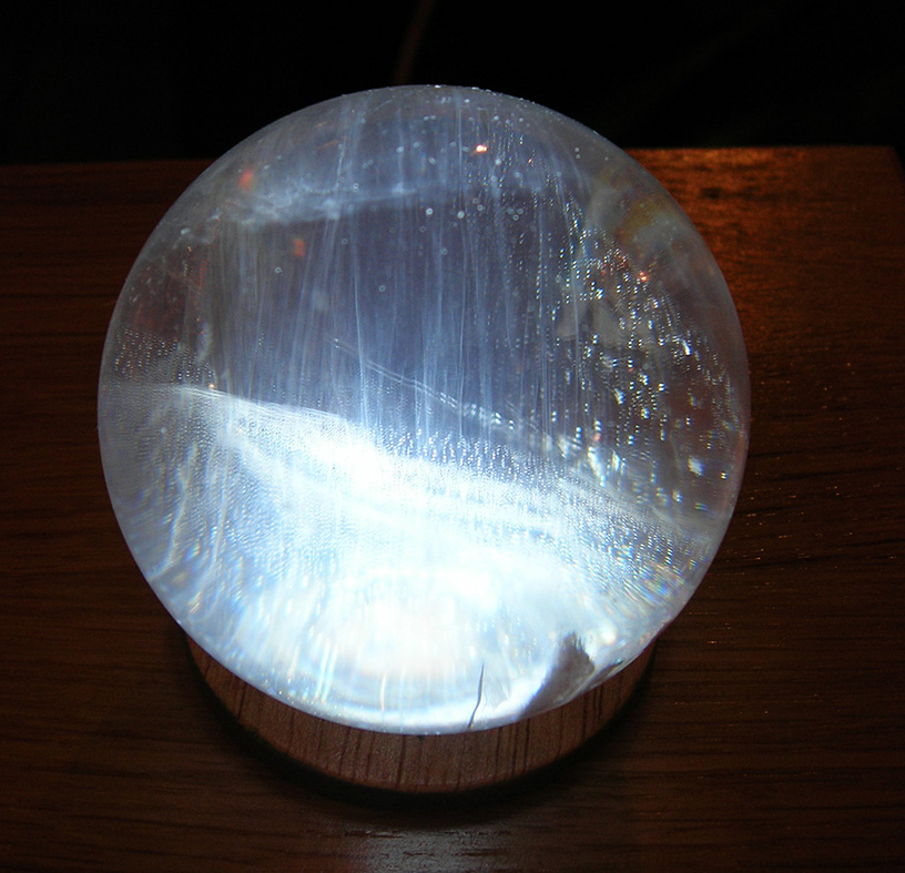 Boule de quartz poli.Les filaments bleus seraient dûs à des inclusions gazeuses (?)